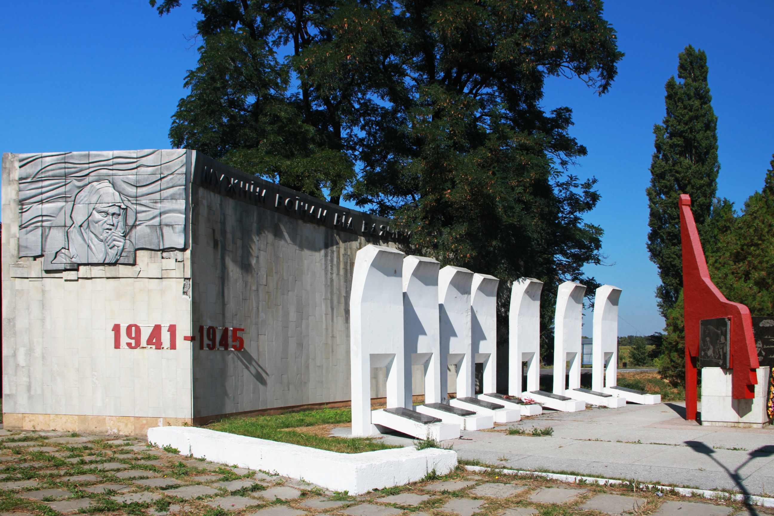 Пам'ятний знак воїнам-землякам. Вид ліворуч, Світловодськ, вул. Робоча,1